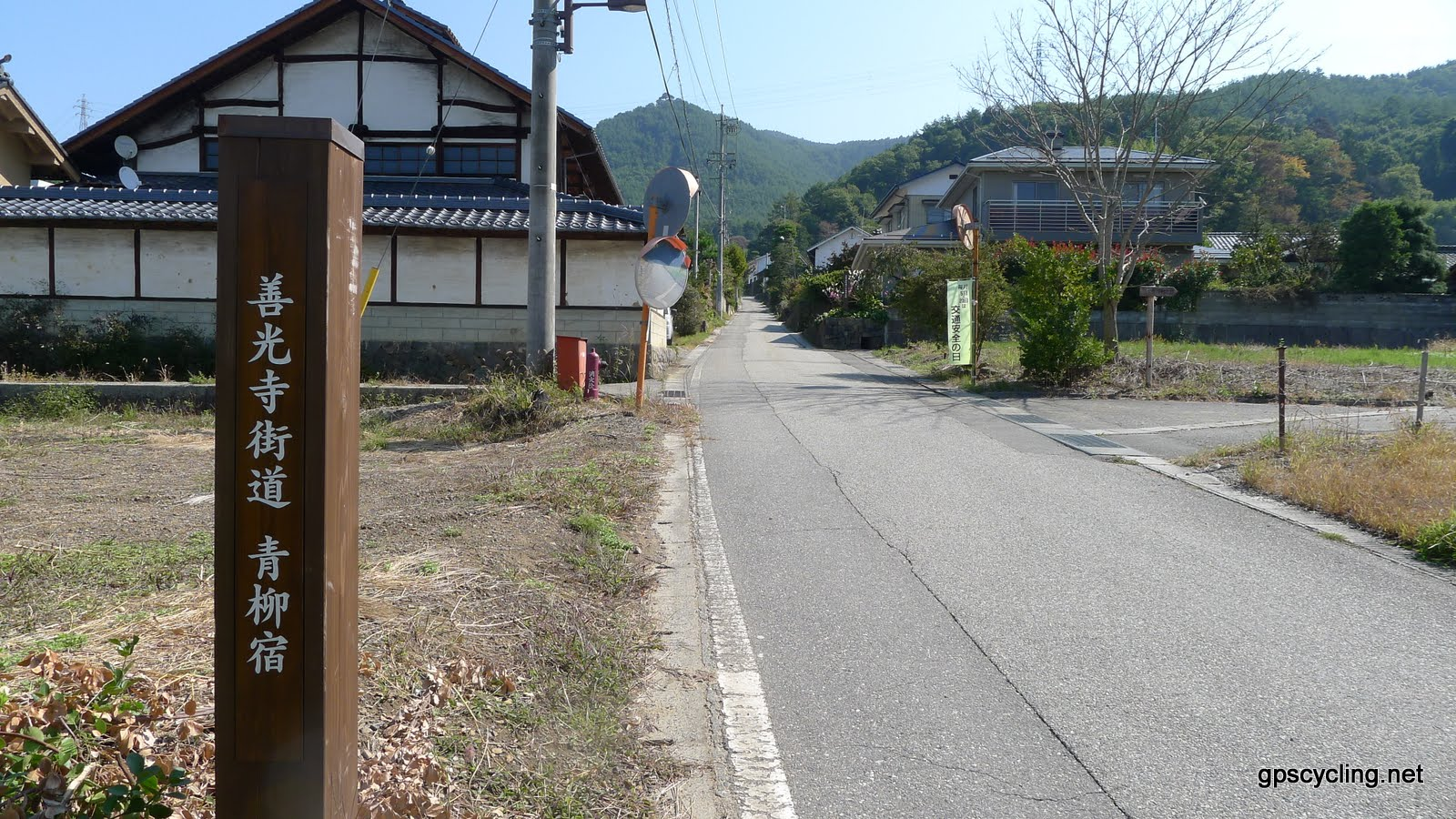 善光寺街道青柳宿